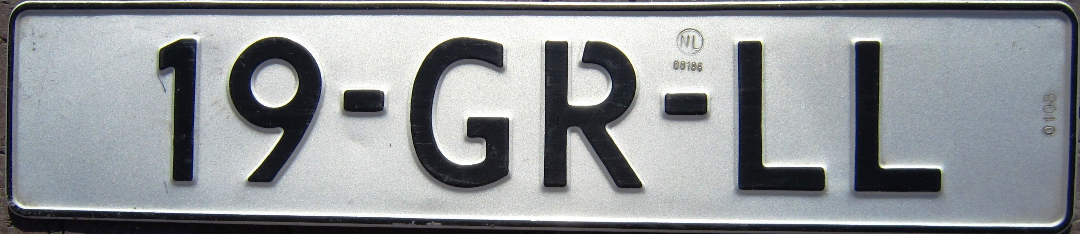 aanhang kenteken